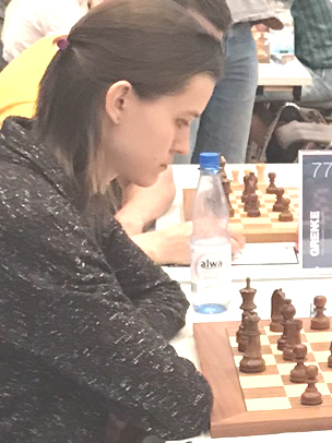 Vera Nebolsina, Runde 8 der Grenke Chess Open 2019 in Karlsruhe.